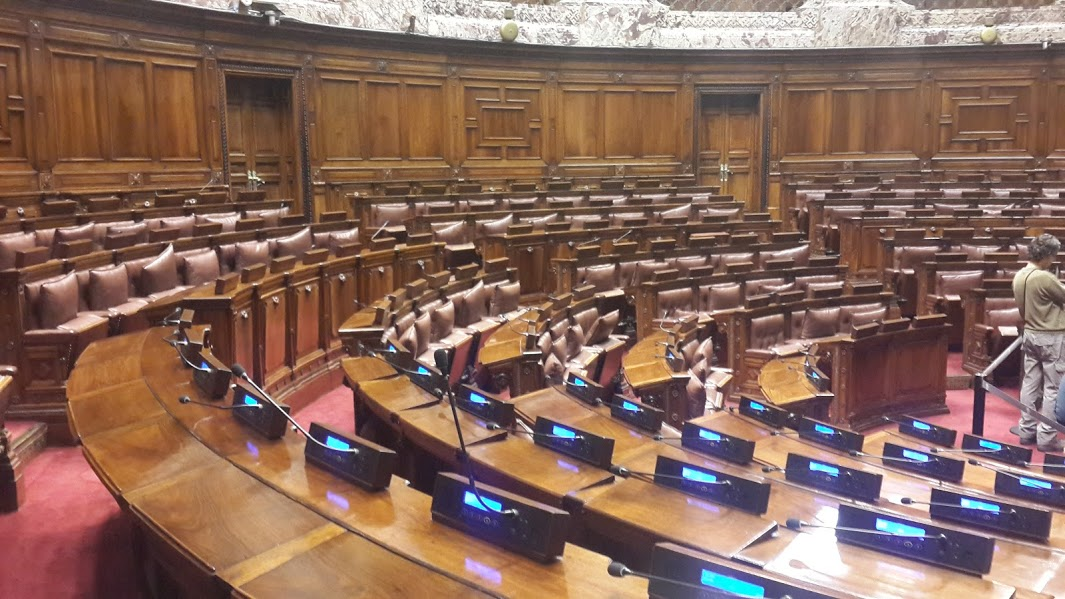 Cámara de diputados del Palacio Legislativo.